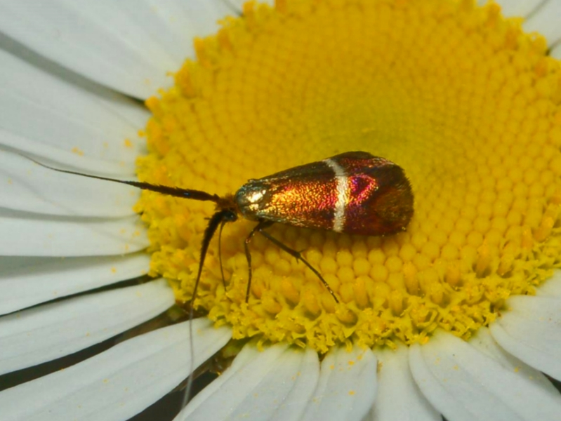 Adela australis